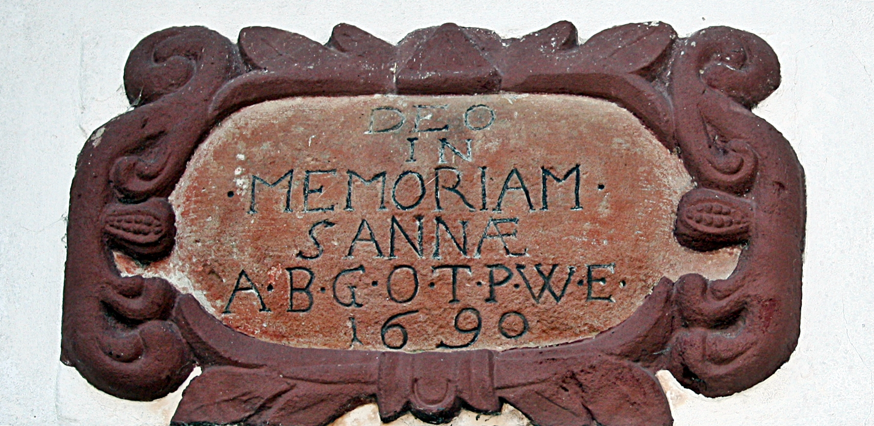 Brilon, Wülfte, Kapelle St. Anna, Inschrift über dem Eingang